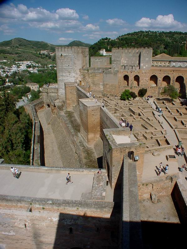 Granada Alhambra eigenes Foto 2004 public domain Mewes 07:57, 5. Mär 2005 (CET) Blick über die Alcazaba